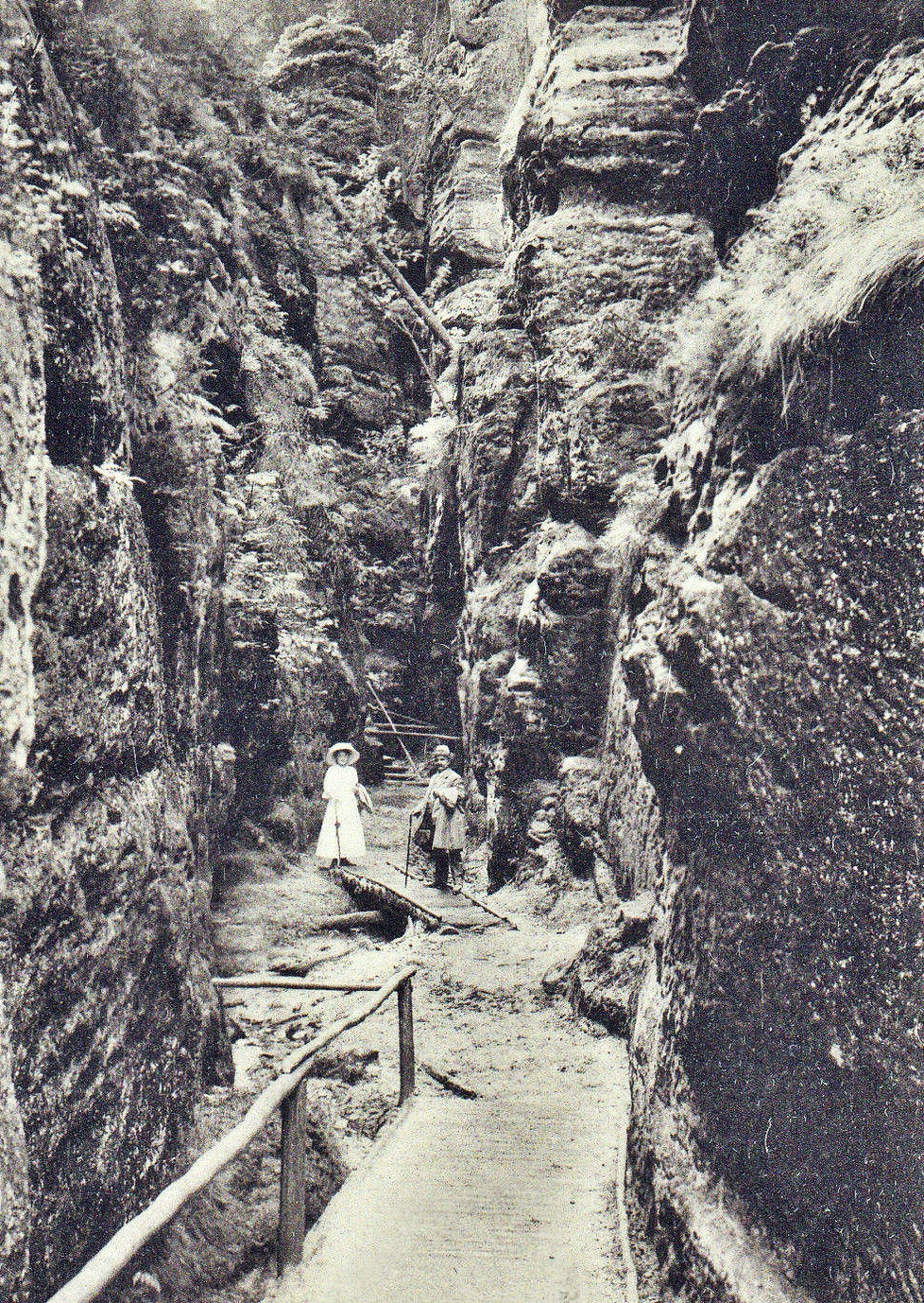 Elbsandsteingebirge/Sächsische Schweiz: historische Ansicht des 1886 durch die Schwedenlöcher, eine klammartige Schlucht, angelegten Wanderweges.